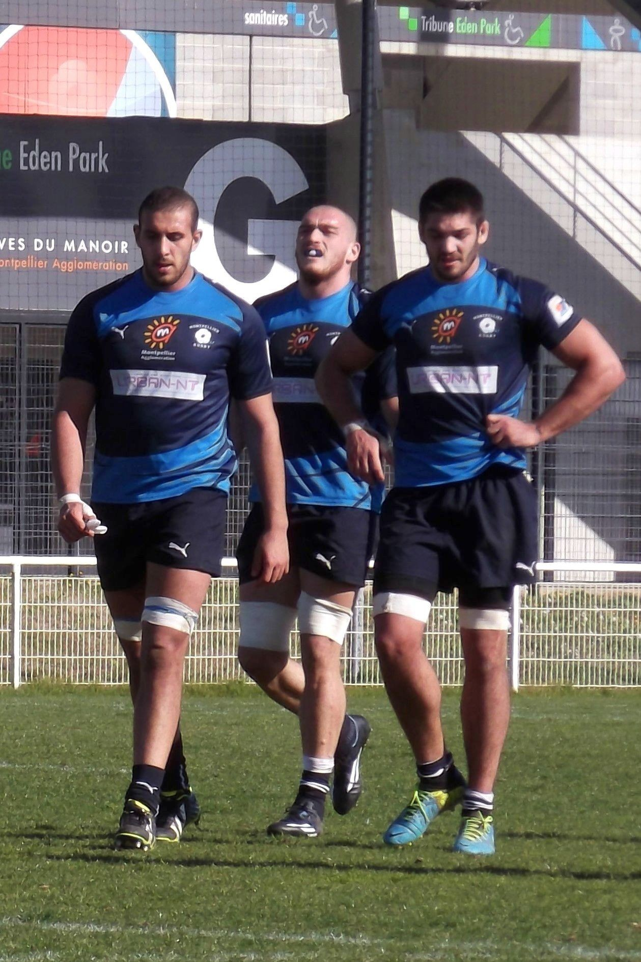 Match Espoirs MHR (mars 2014) : Johan Aliouat, Lasha Lomidze, Kévin Gimeno (de gauche à droite).